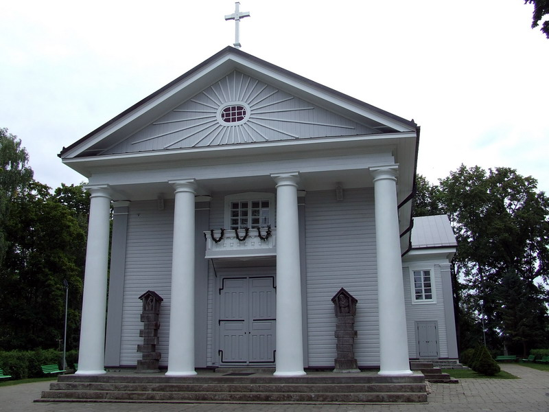 Švč. Mergelės Marijos Ėmimo į dangų church, Pivašiūnai, Lithuania.